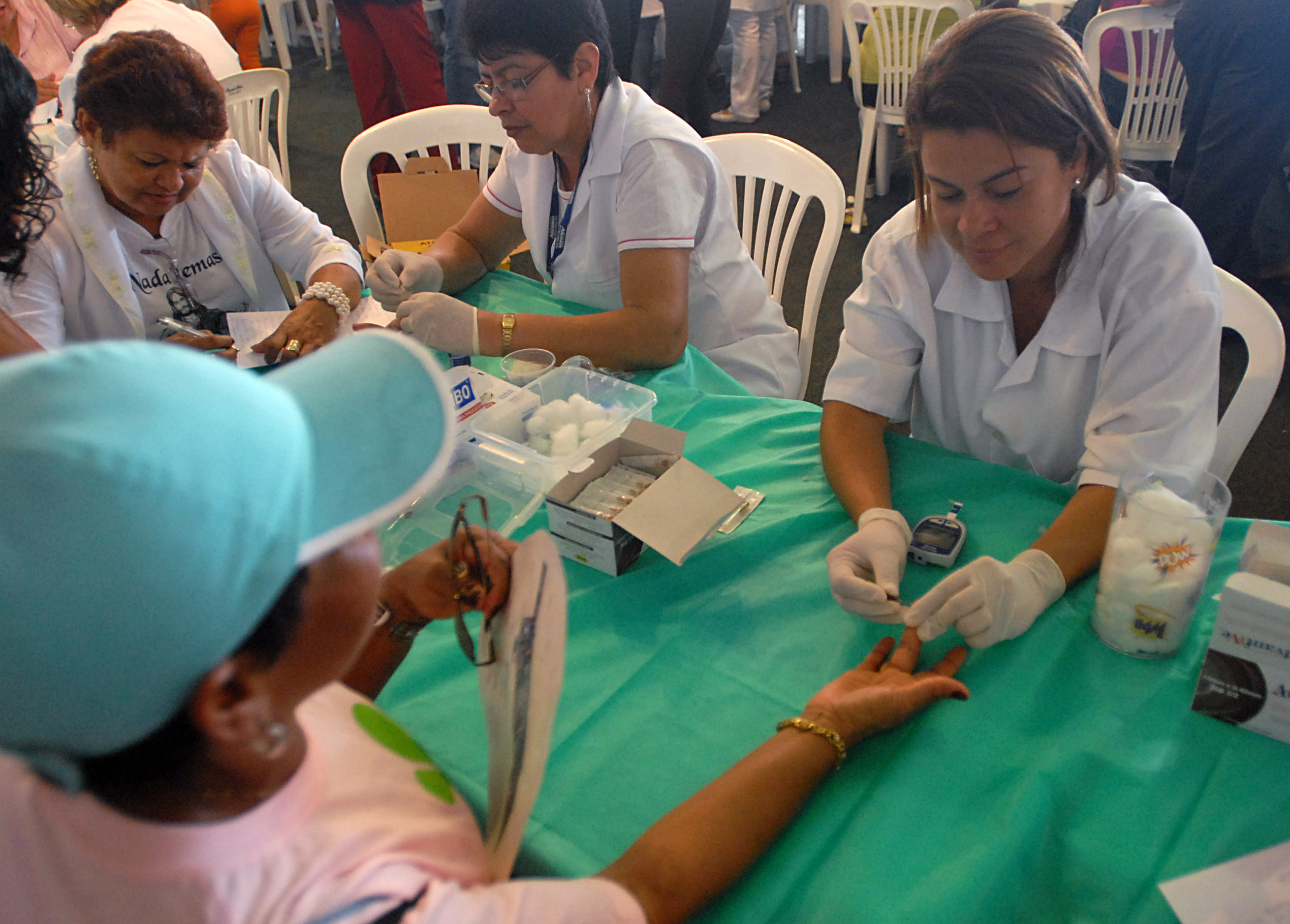 Moradora passa por exame de taxa de glicose durante as atividades do Dia Internacional da Mulher, no Parque da Cidade em Brasília